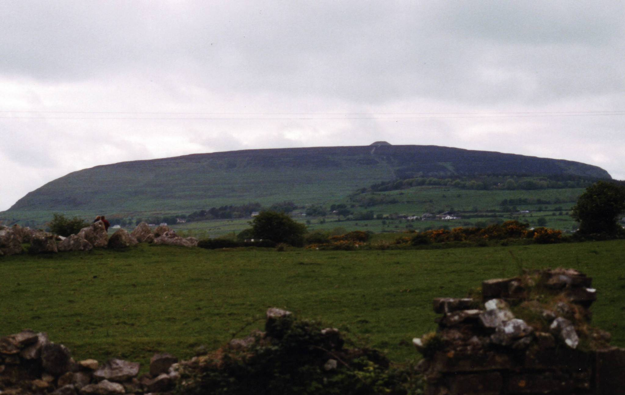 Knocknarea (Cnoc na Riabh)